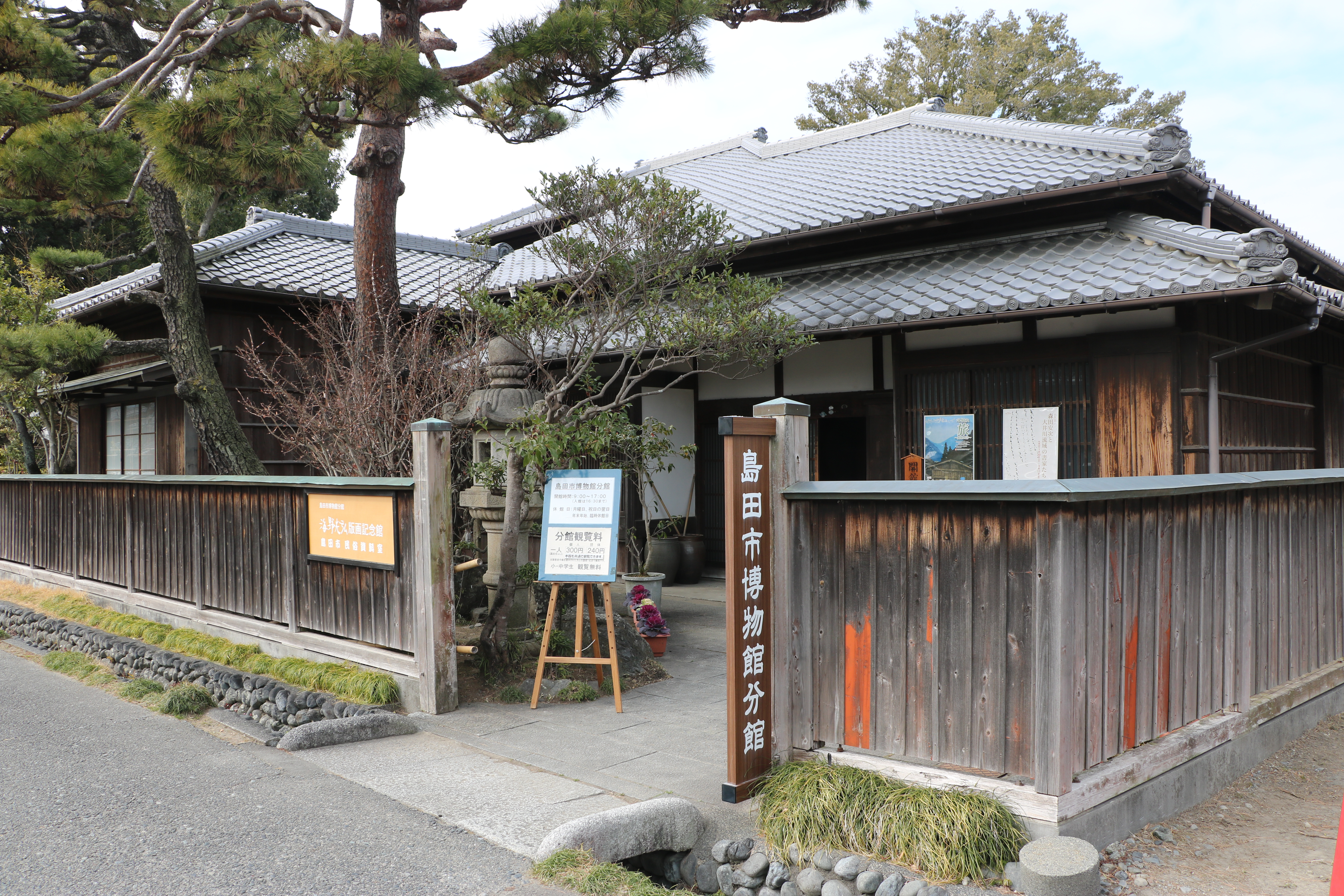 島田市博物館分館。